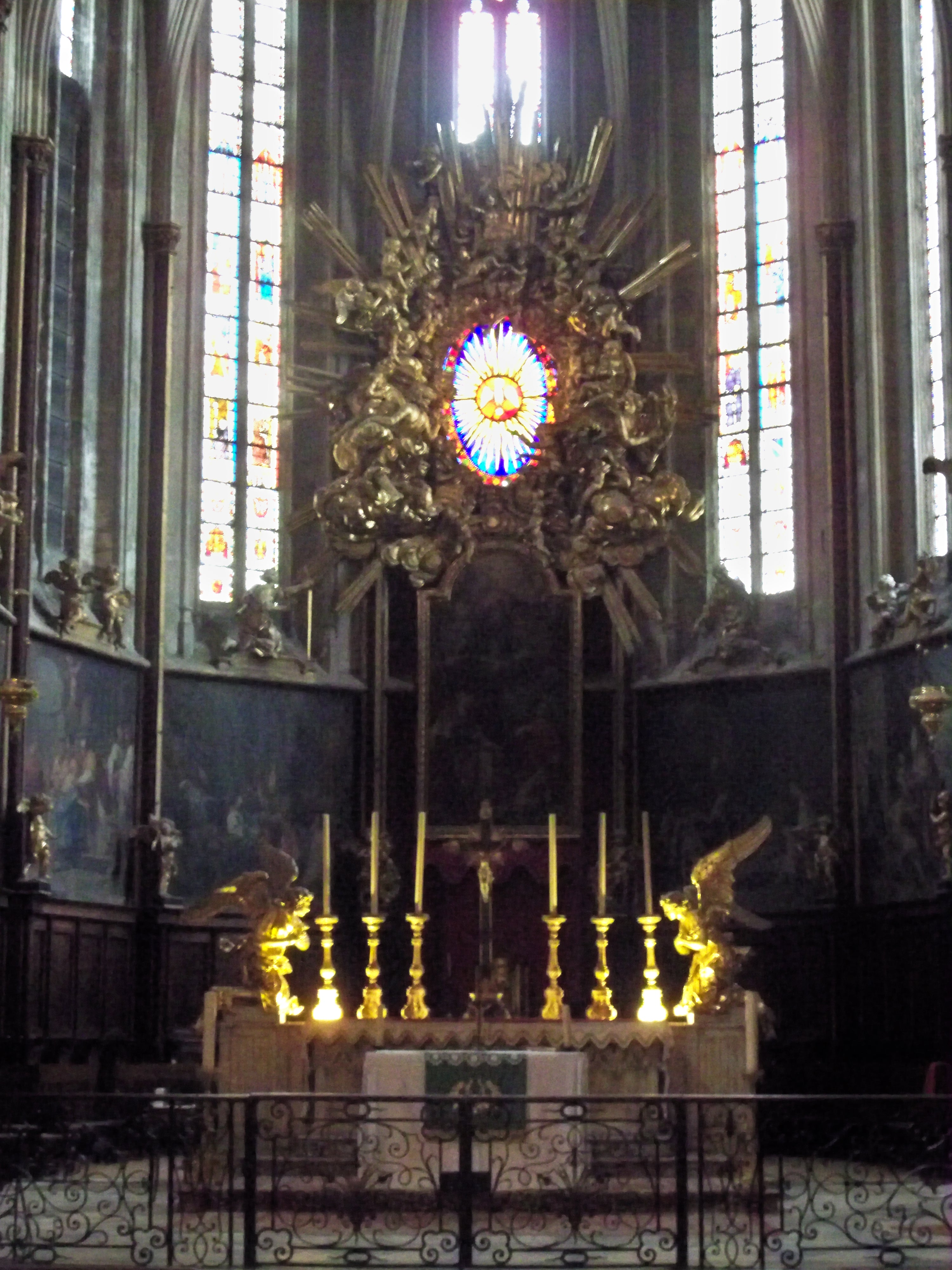 Autel de la cathédrale Saint Siffrein, Carpentras, (Vaucluse, France).